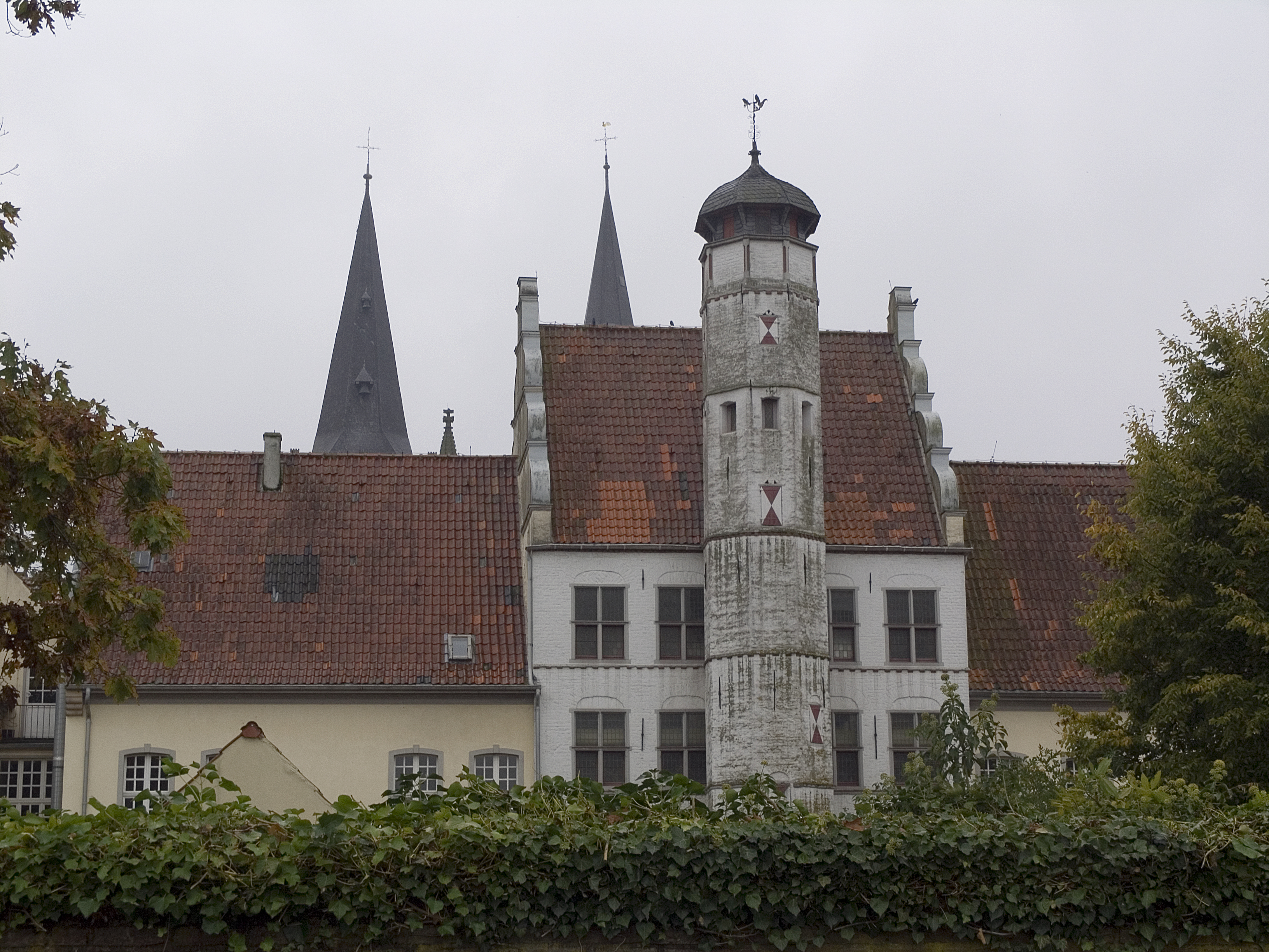 Северный Рейн - Вестфалия, Ксантен - монастырь картезианцев